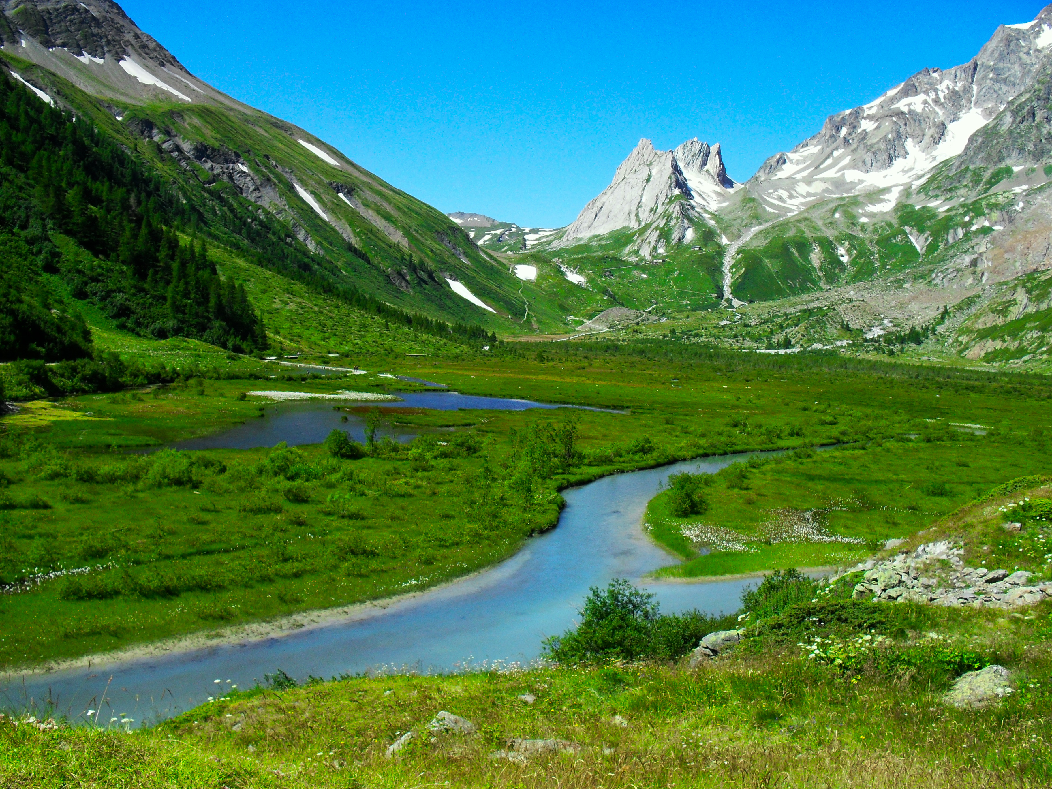 Valle che porta agli ambienti glaciali della Val Veny